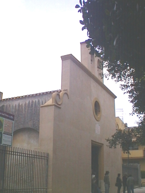 Facciata della chiesa settecentesca di Sant'Efisio a Quartu